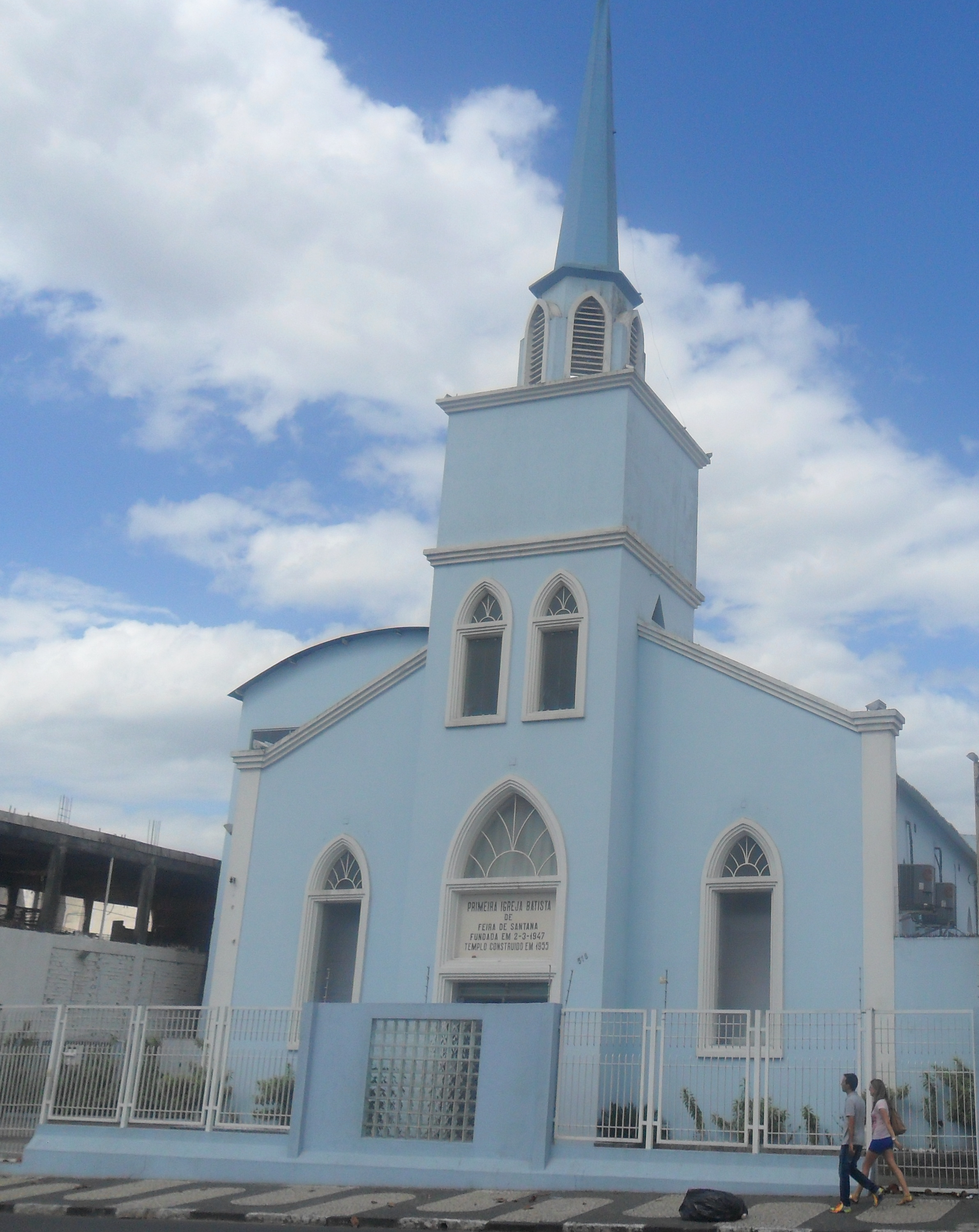 igreja Batista